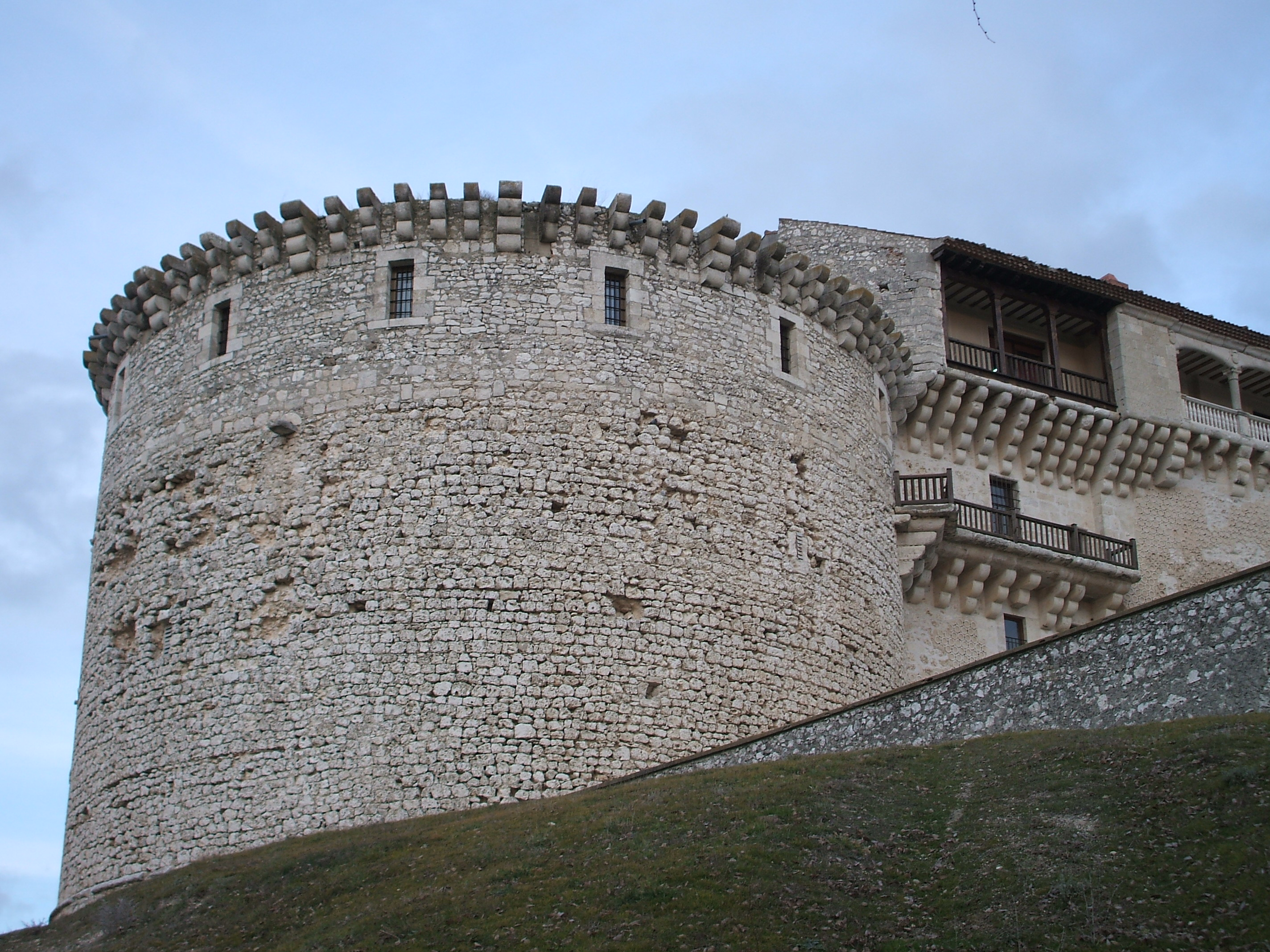 Torreón de Santo Domingo, una de las torres fuertes del